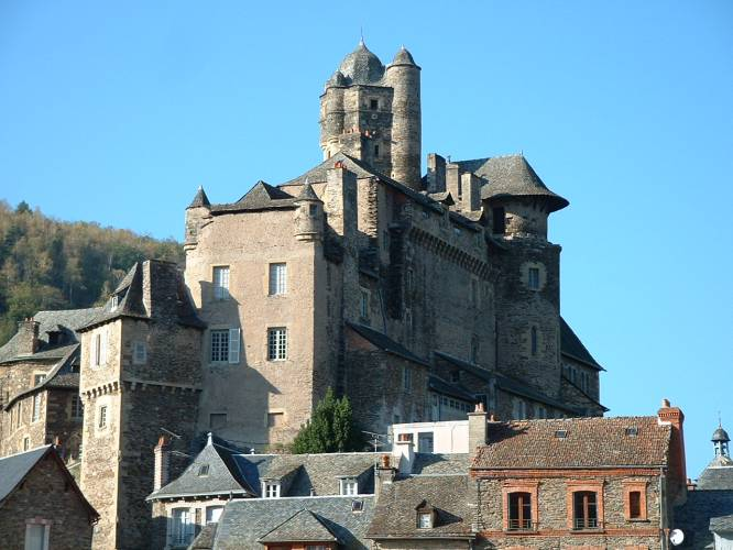 Château d'Estaing datant du XV - XVI - XVII èmes siècles.Berceau de l'illustre famille Estaing.